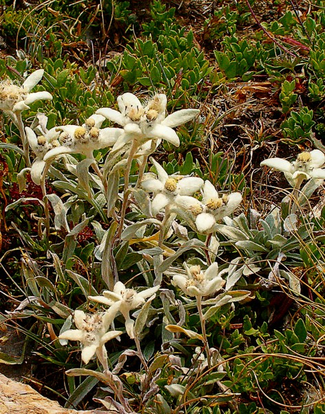 Edelweiss op de Monte Vettore